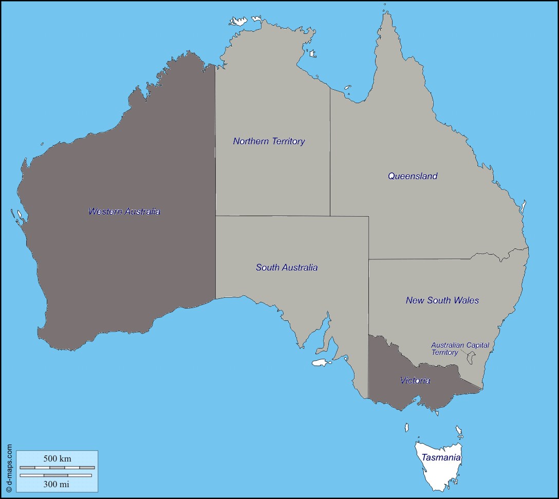 'ndrangheta in Australia